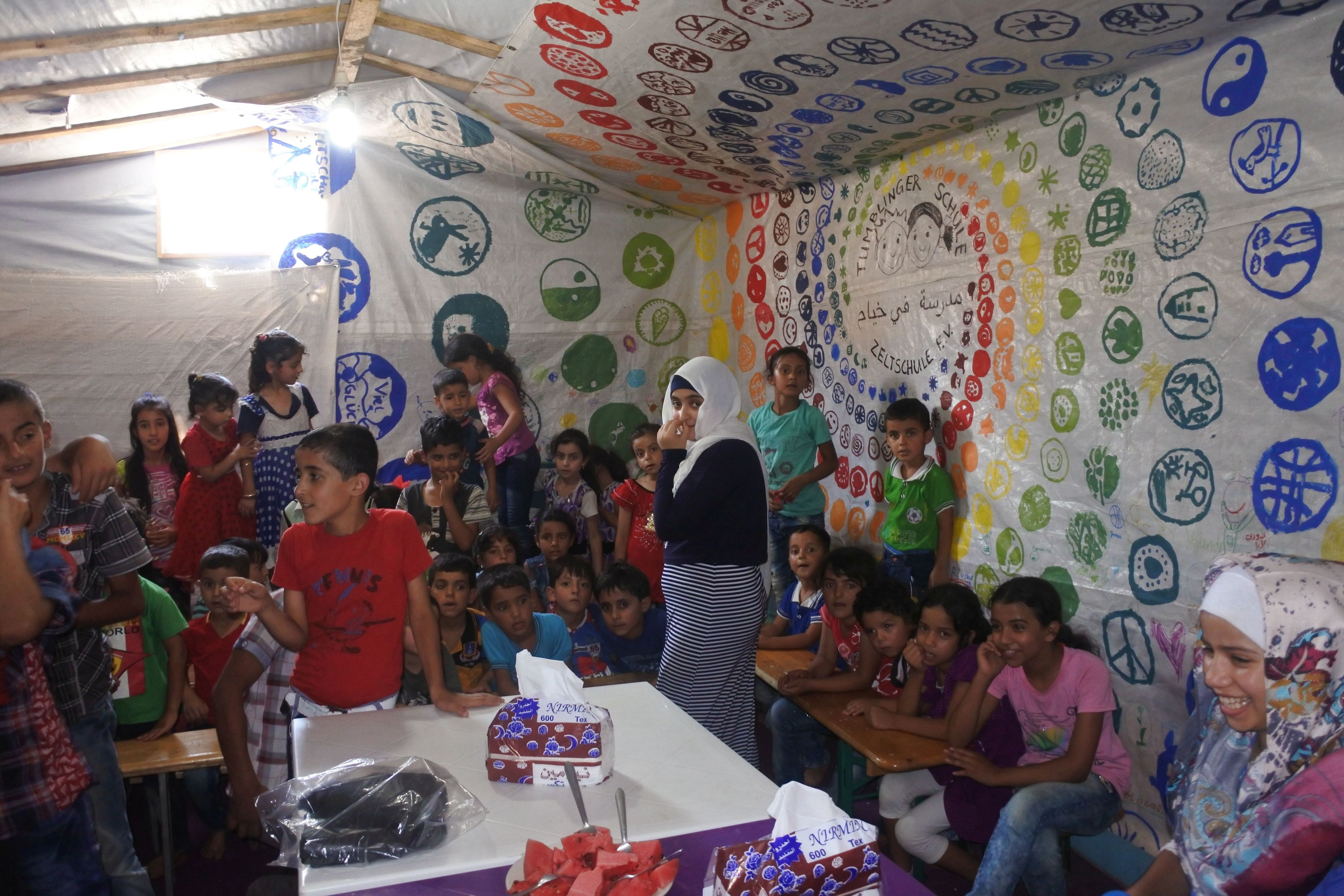 Das ist die erste Zeltschule im Libanon mit der bemalten Zeltplane der Schulkinder aus München.